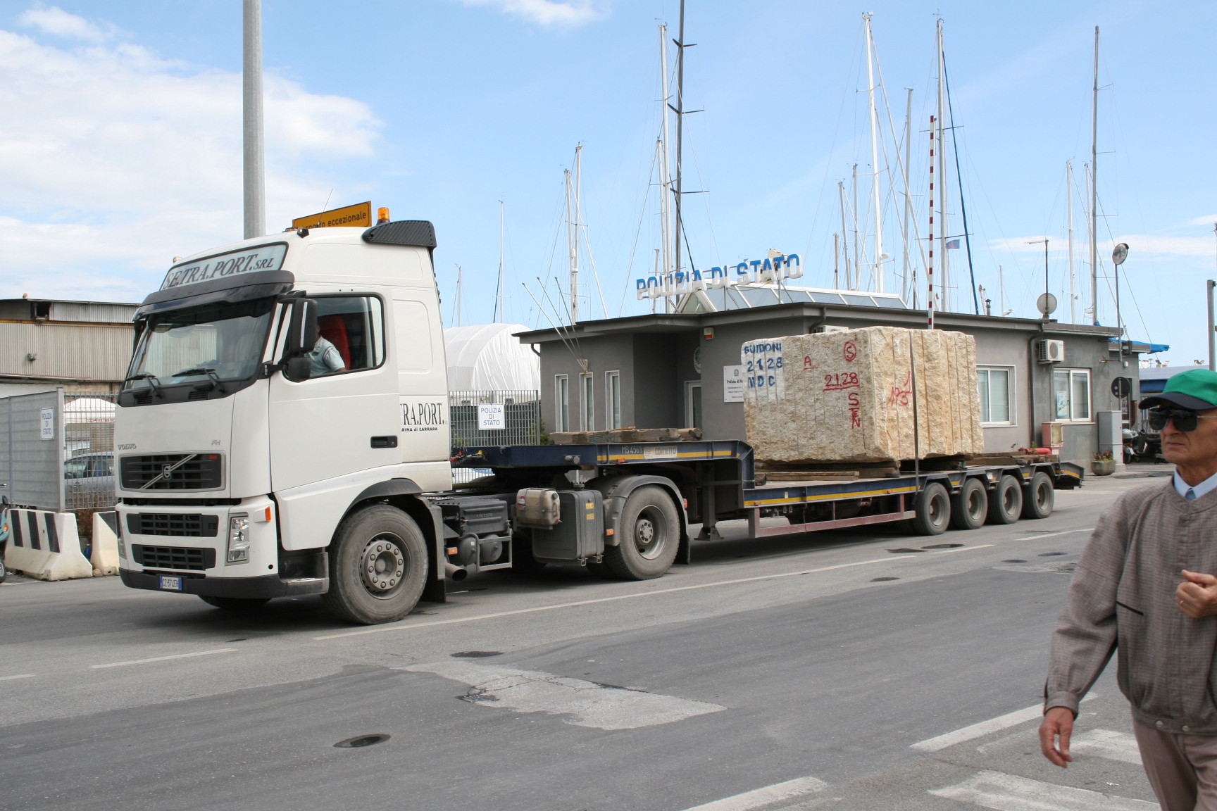 Lkw-Transport von Rohsteinen aus dem Hafen von Massa-Carrara/Italien